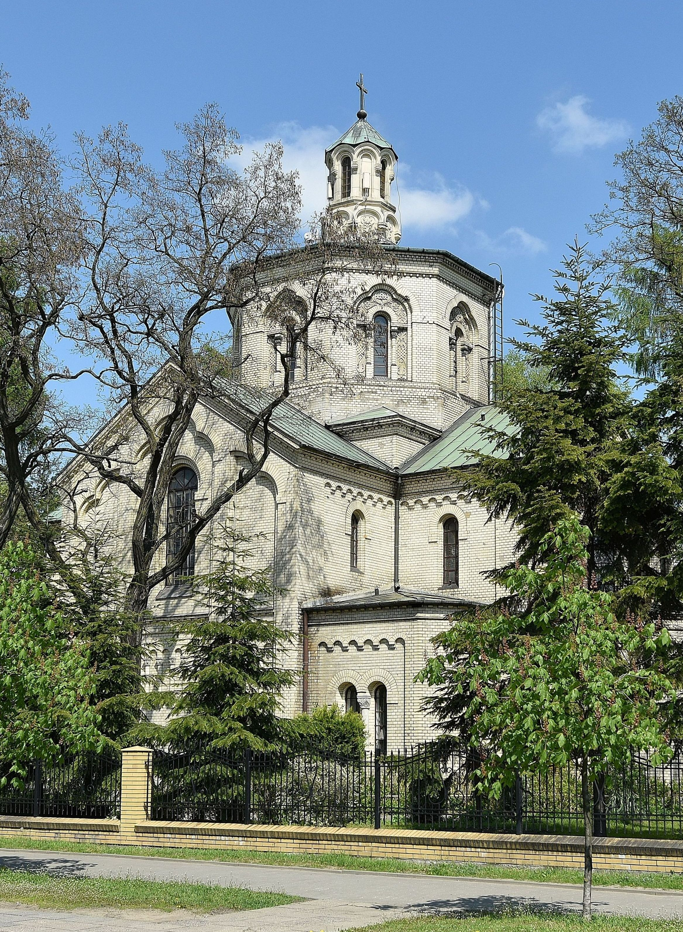 Katedra polskokatolicka Świętego Ducha w Warszawie